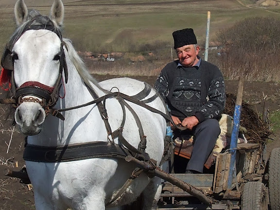 Activitati agricole executate manual